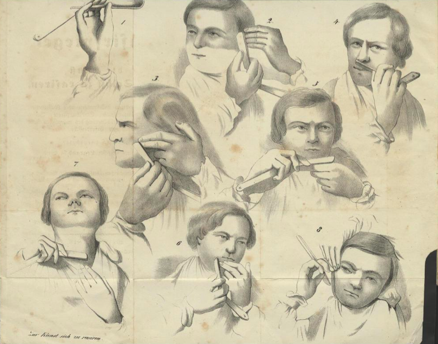 Aus: Rasirspiegel oder die Kunst sich selbst zu rasiren, nebst den nothwendigen Belehrungen über Rasirmesser, Englische Mineralpaste, Streichapparate, Seifen und alles zur Verschönerung des männlichen Antlitzes Erforderliche. Faßlich dargestellt von Herrn Professor Legrand in Paris. Aus dem Französ. übersetzt und … vermehrt von Leopold Reinig, Weimar 1846, online abrufbar über die Sächsische Landesbibliothek – Staats- und Universitätsbibliothek Dresden.